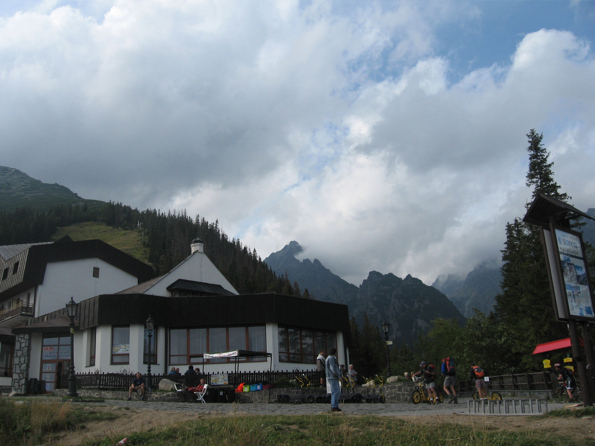 horský hotel Hrebienok